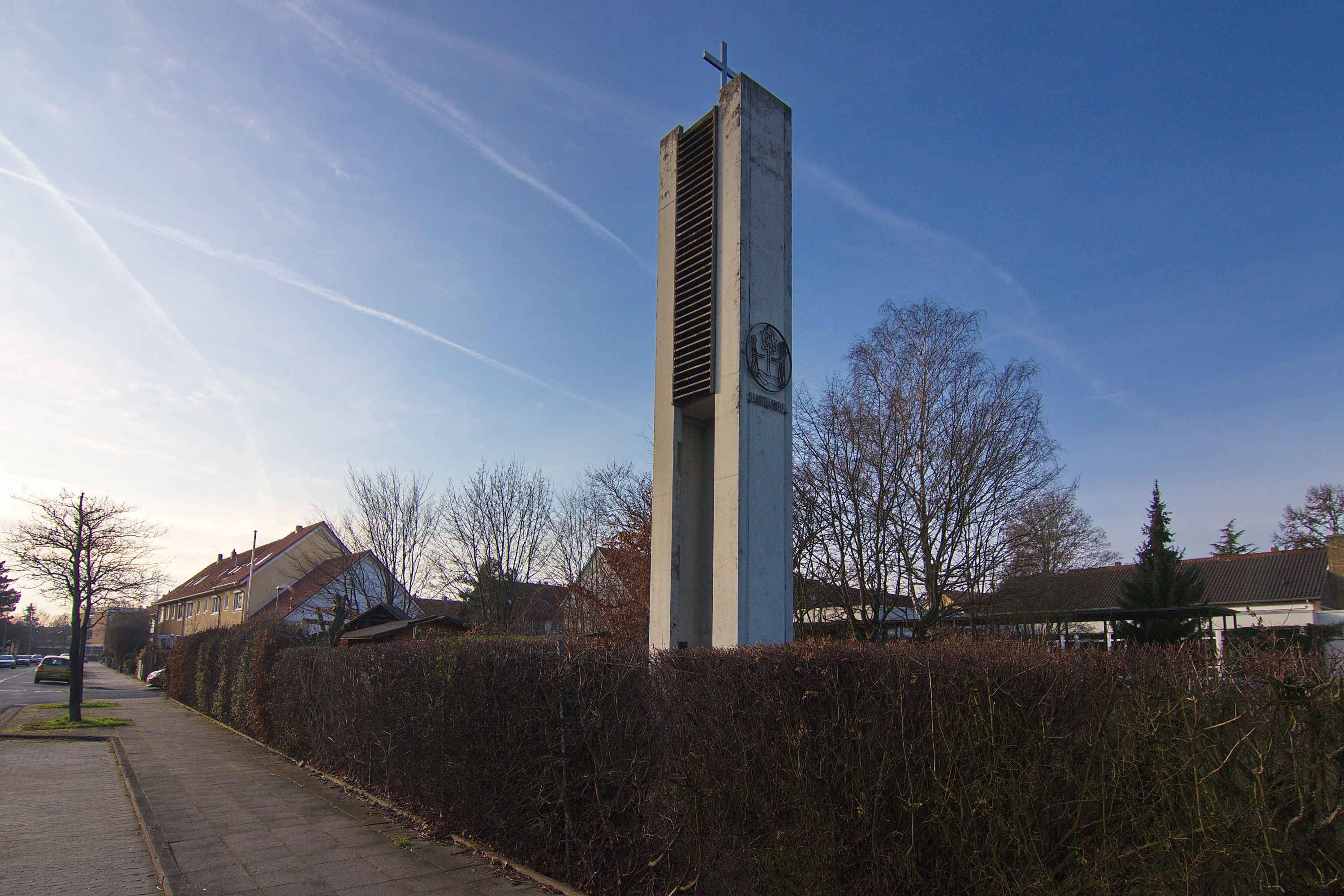 St.-Nathanael-Kirche in Bothfeld (Hannover), Niedersachsen, Deutschland